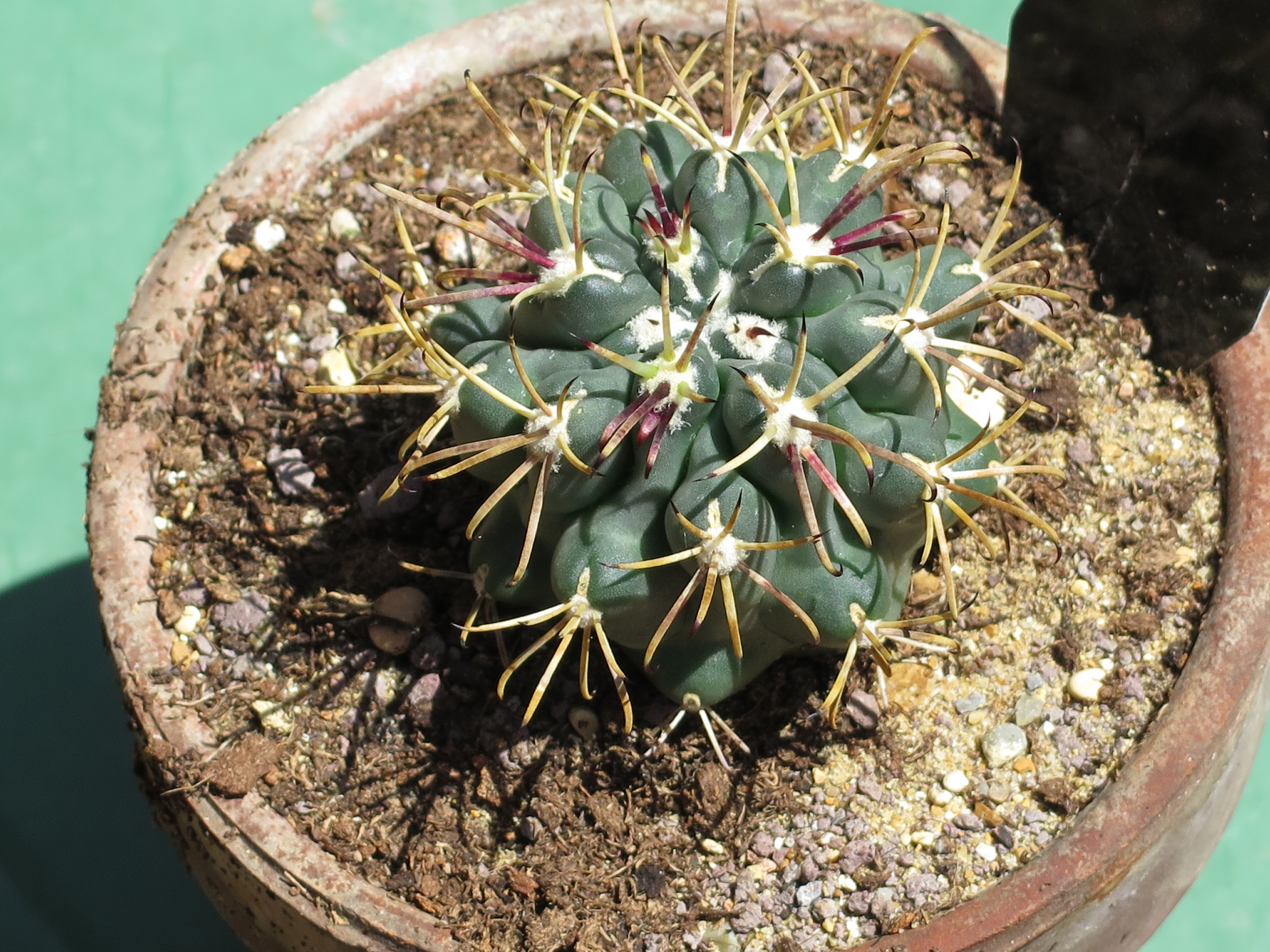 Sclerocactus uncinatus